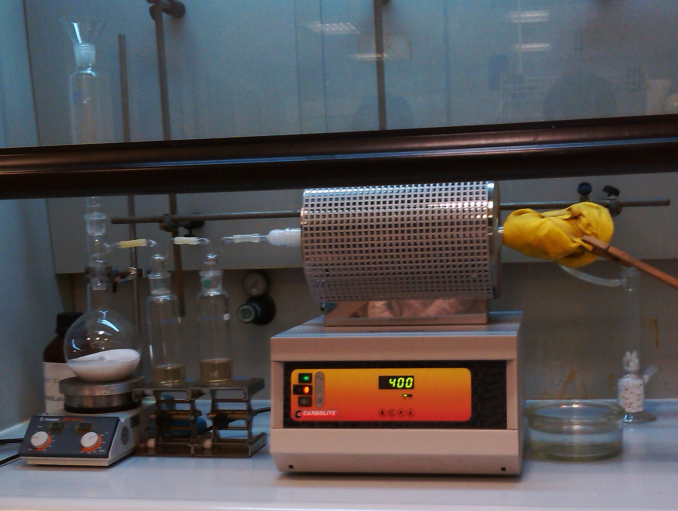 Universidad de Jaén, Laboratorio de Química Inorgánica (4ª planta del edificio A2).